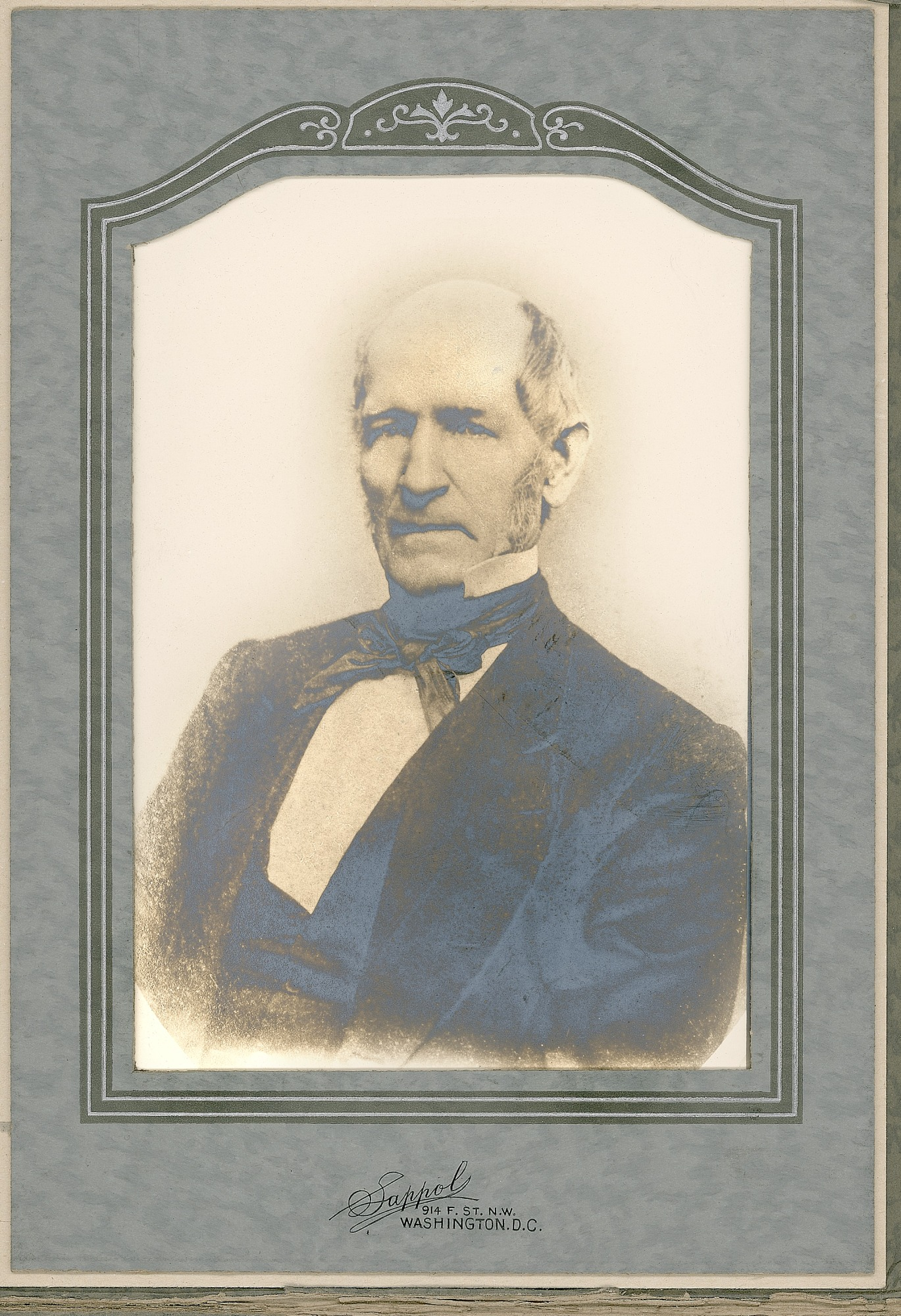 Уильям Данлоп Брейкенридж (1810-1893) - шотландский садовник и ботаник в возрасте 70 лет.